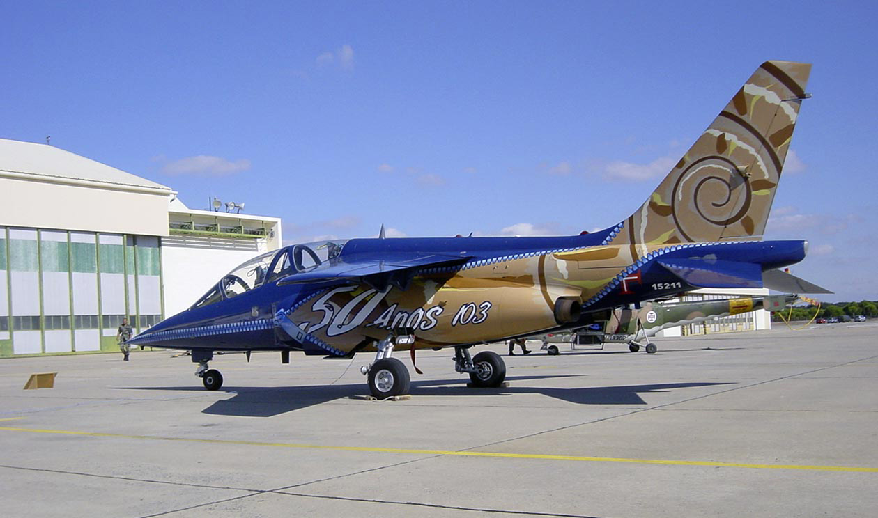 Description